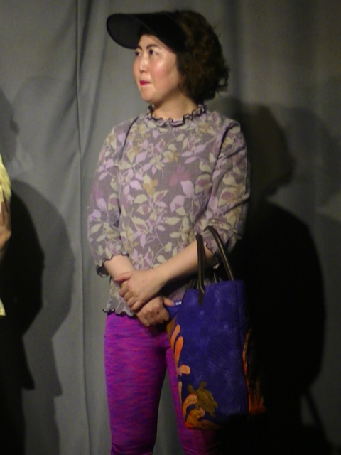 あぁ〜しらき (2018年9月)